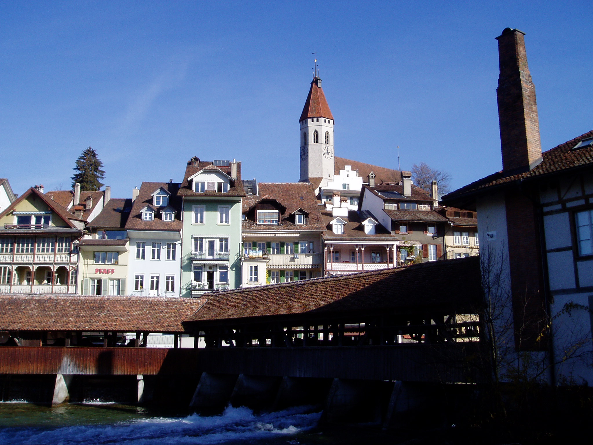 Thun